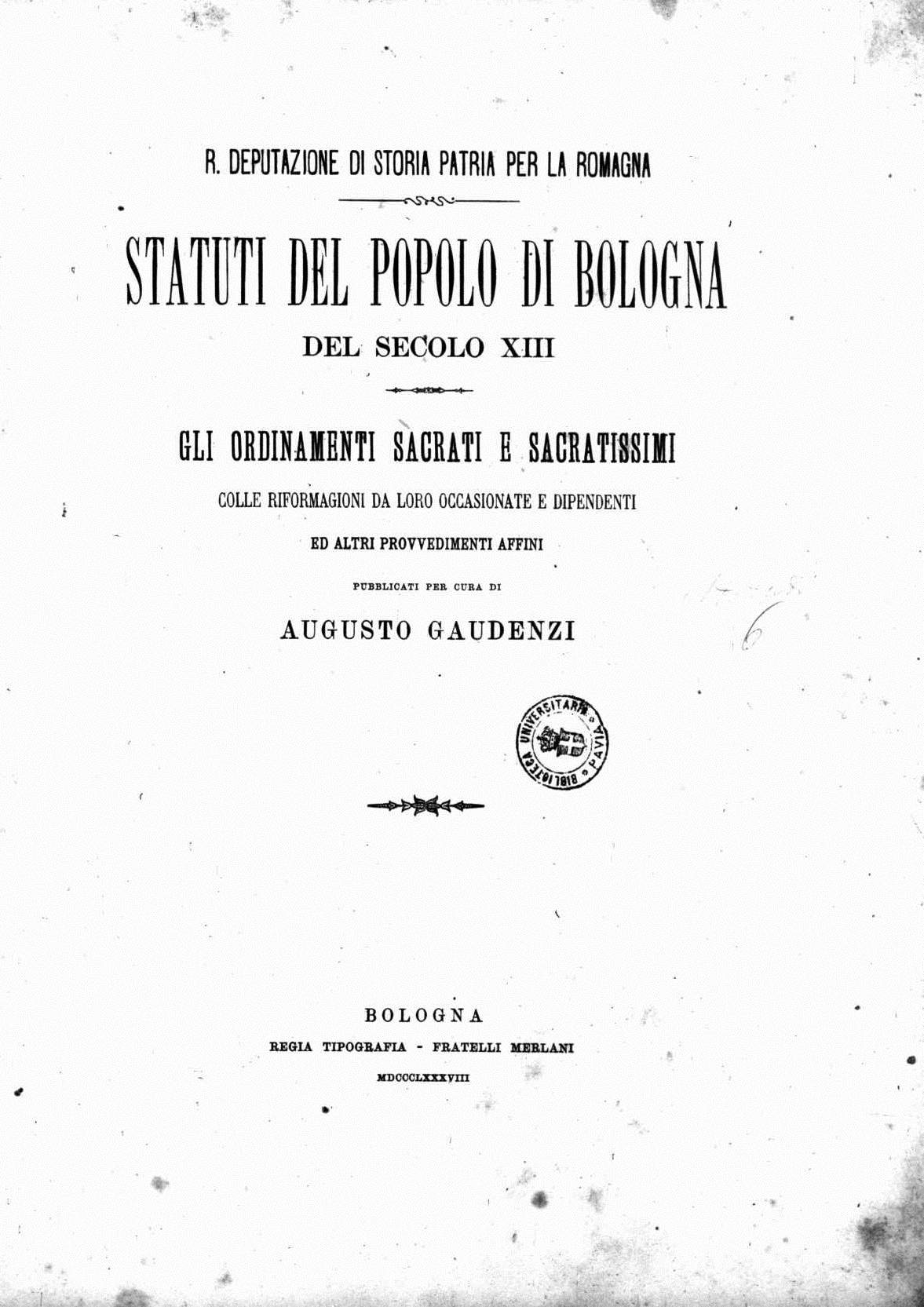 Frontespizio